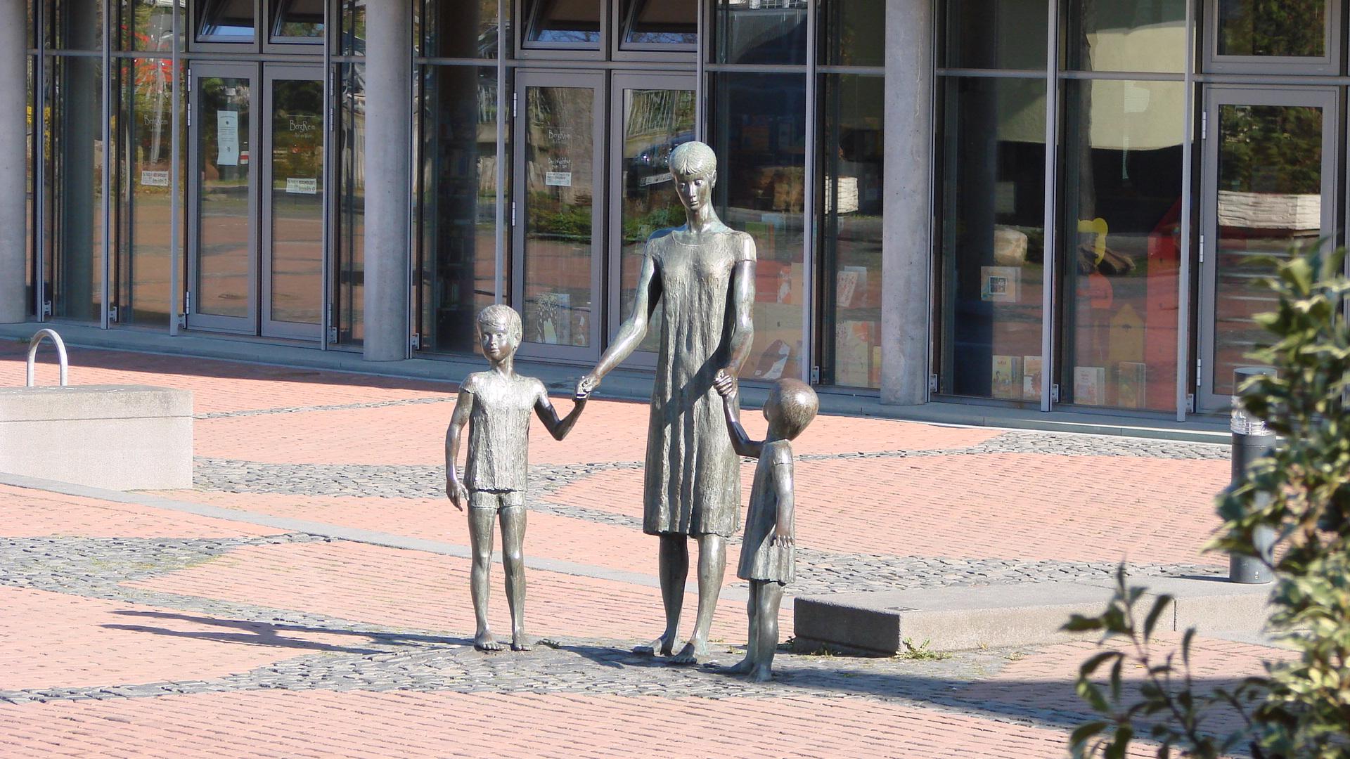 Die Skulptur Mutter mit Sohn und Tochter in Bergheim, geschaffen von dem deutschen Bildhauer Heinz Klein-Arendt (1916–2005) aus Bergheim-Oberaußem.